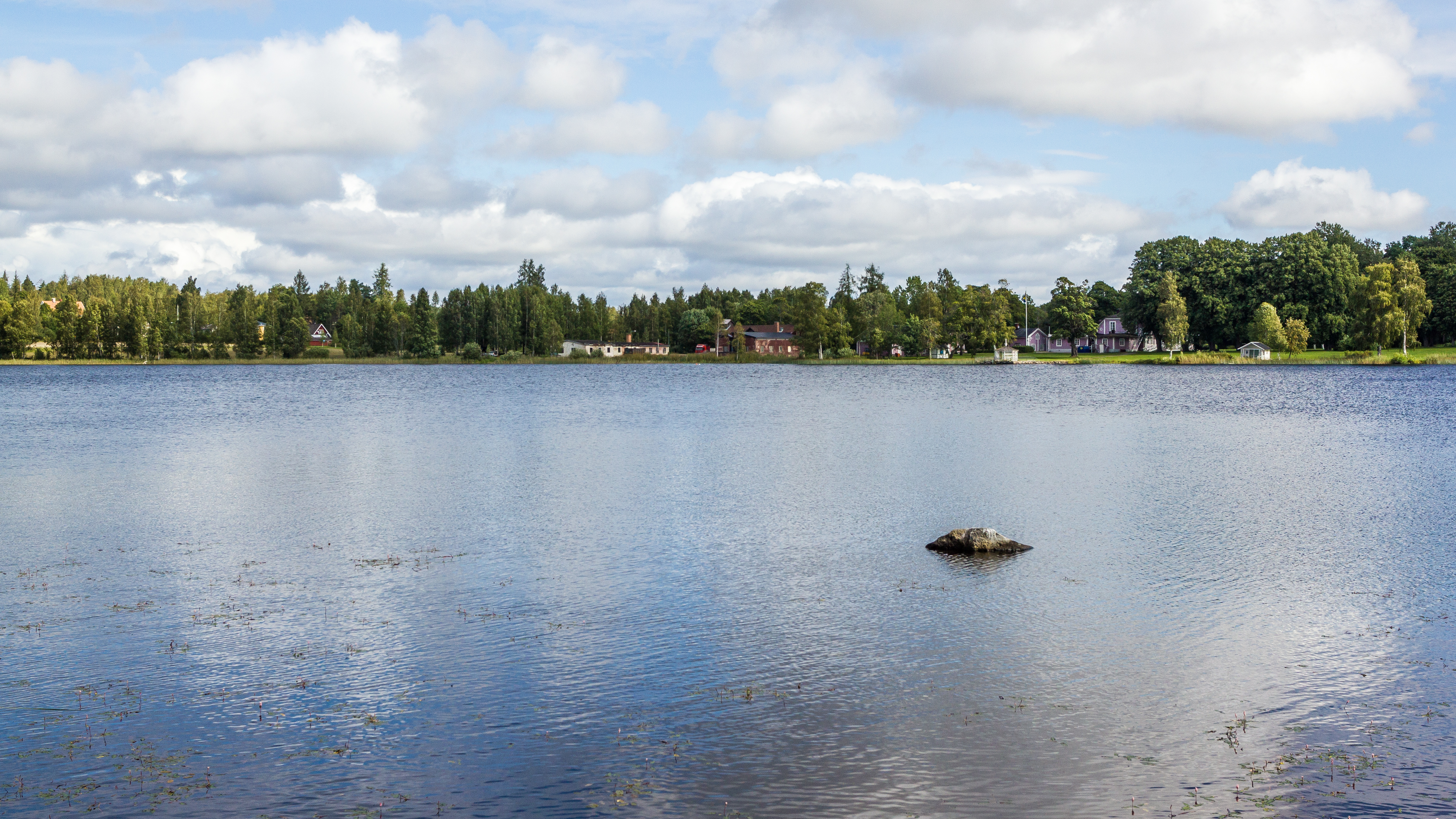 Vikmanshyttesjön, i bakgrunden Vikmanshytte herrgård. Vikmanshyttan, Hedemora kommun, Dalarna, Sverige.